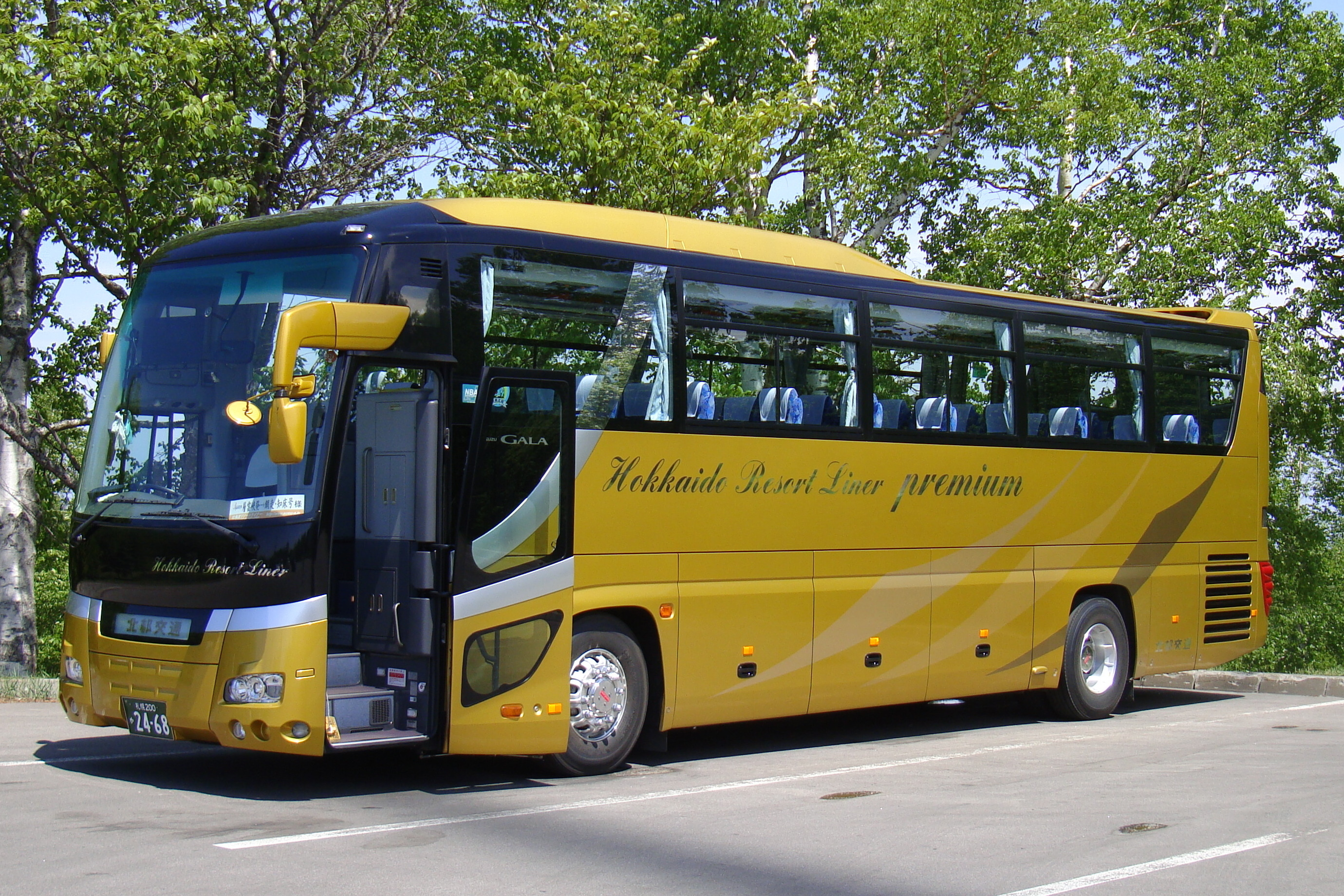 Hokkaidō Resort Liner